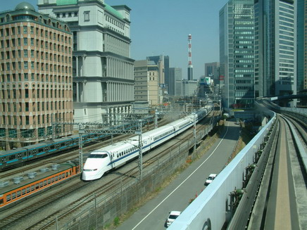 Shinkansen de la série 300 aux alentours de Shimbashi (Tokyo), île de Honshu, Japon Photo Eric Binamé, en 2004